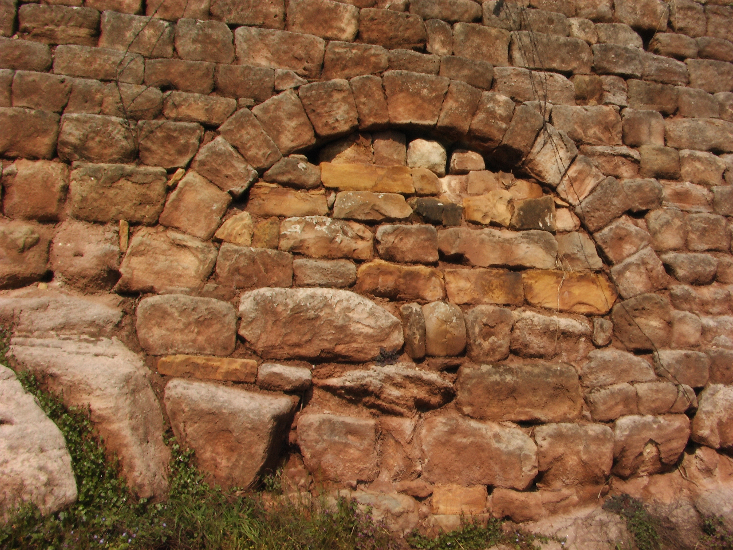 Fachmännisch geschichtete Trockenmauer aus Sandstein einer Weinbergsterrasse in Esslingen am Neckar mit Rundbogen